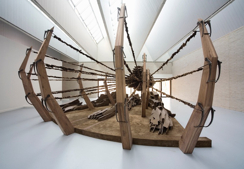 Kunstwerk van Eylem Aladogan, getiteld Before Departure (all my changes were there)